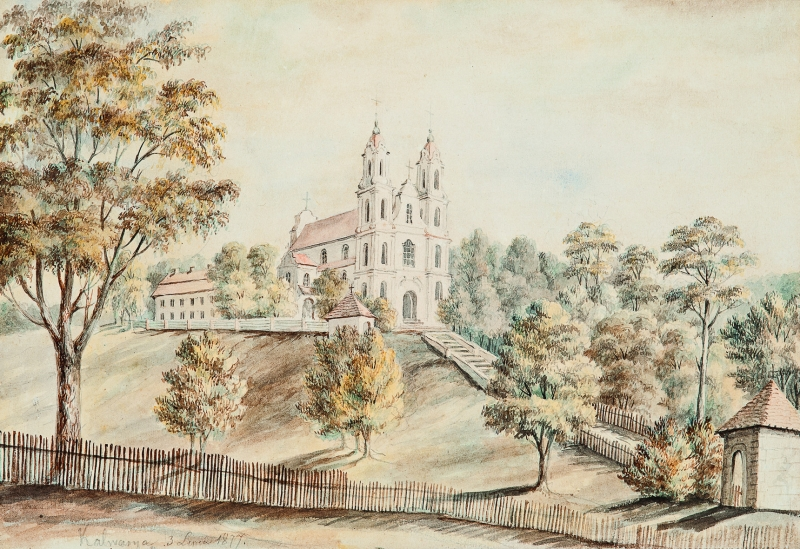 Беларуская (тарашкевіца): Вільня (Vilnia), Кальварыя (Kalvaryja). Касьцёл Адшуканьня Сьвятога Крыжа